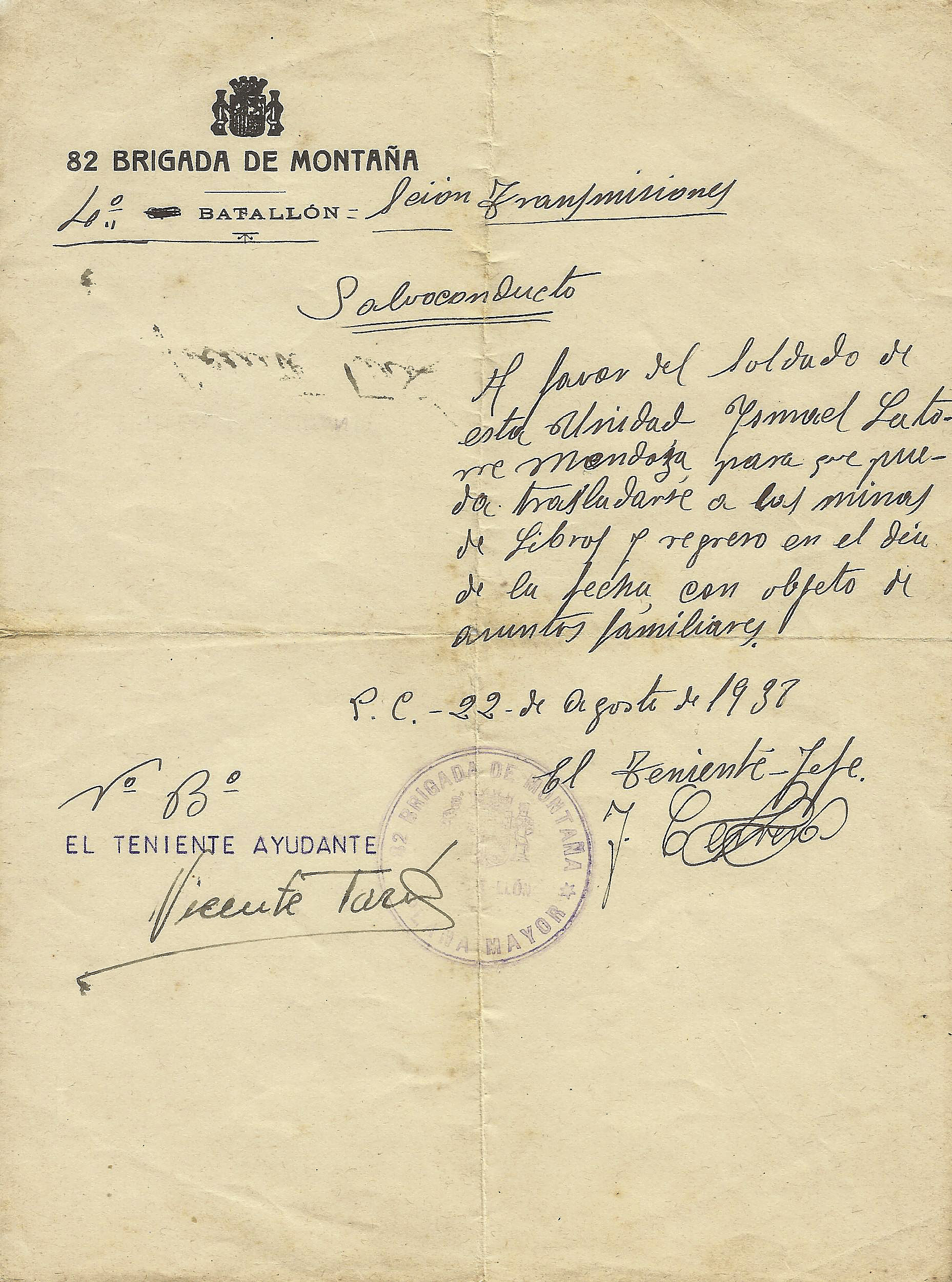 Materials d'Arxiu. Aquest document va ser publicat en: Lozano, Josep i altres. Aljannat III. Monogràfic: Ismael Latorre Mendoza, any 2008. Edita: Ajuntament d'Alginet; ISSN 1886-984 X. Pàgina 49.